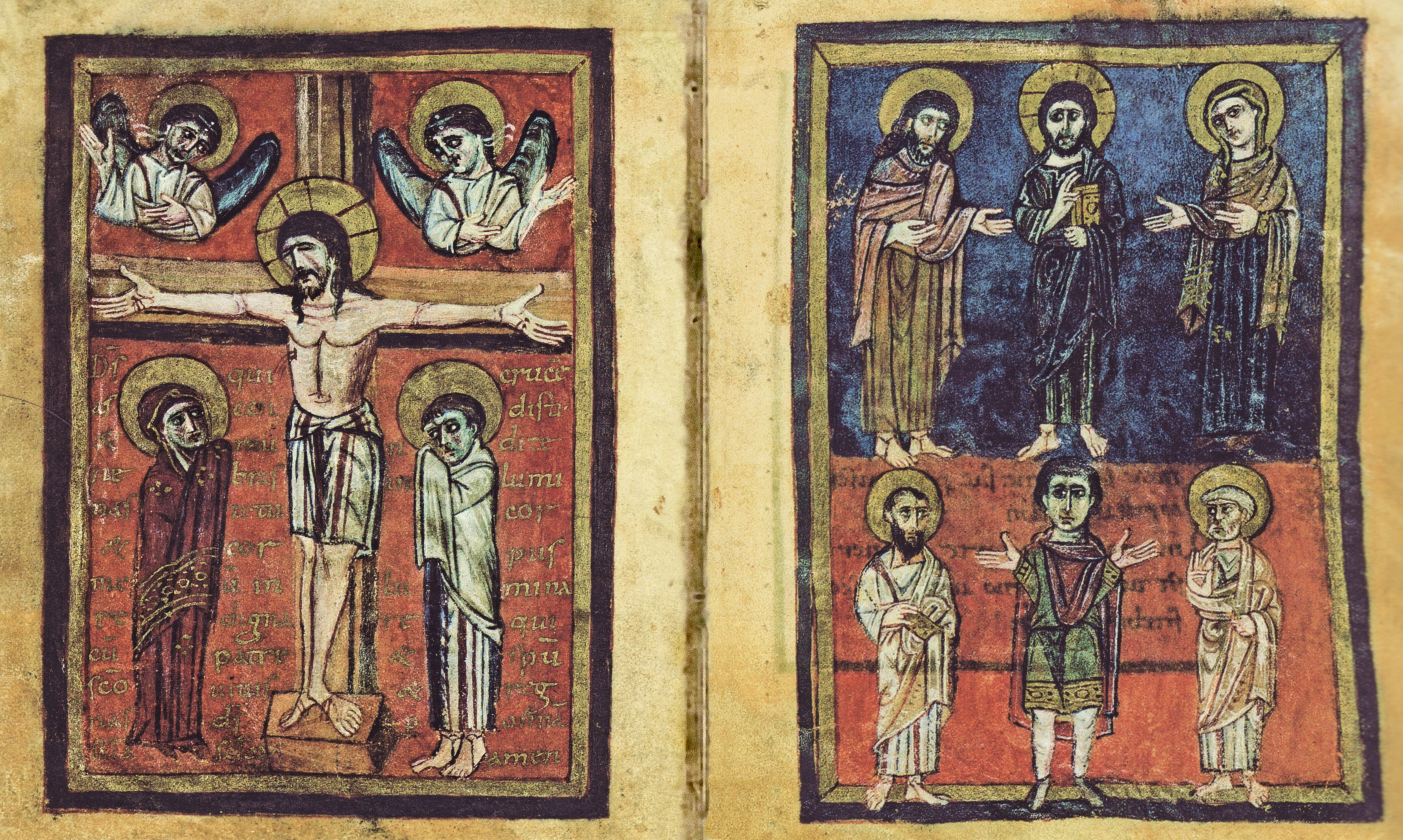 Gebetbuch Ottos III., Fol. 1 und 2; (Bayerische Staatsbibliothek Clm 30111) Mainzer Buchmalerei, entstanden zwischen 984 und 991